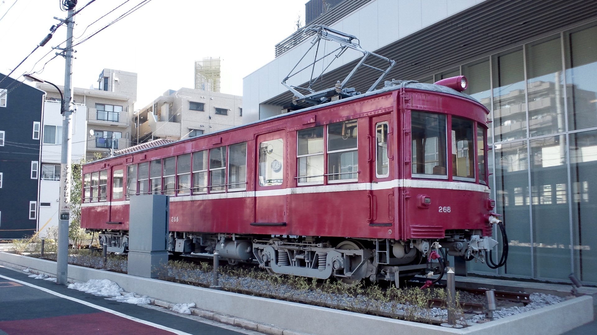 関水金属本社新社屋前に展示されている京急230形電車